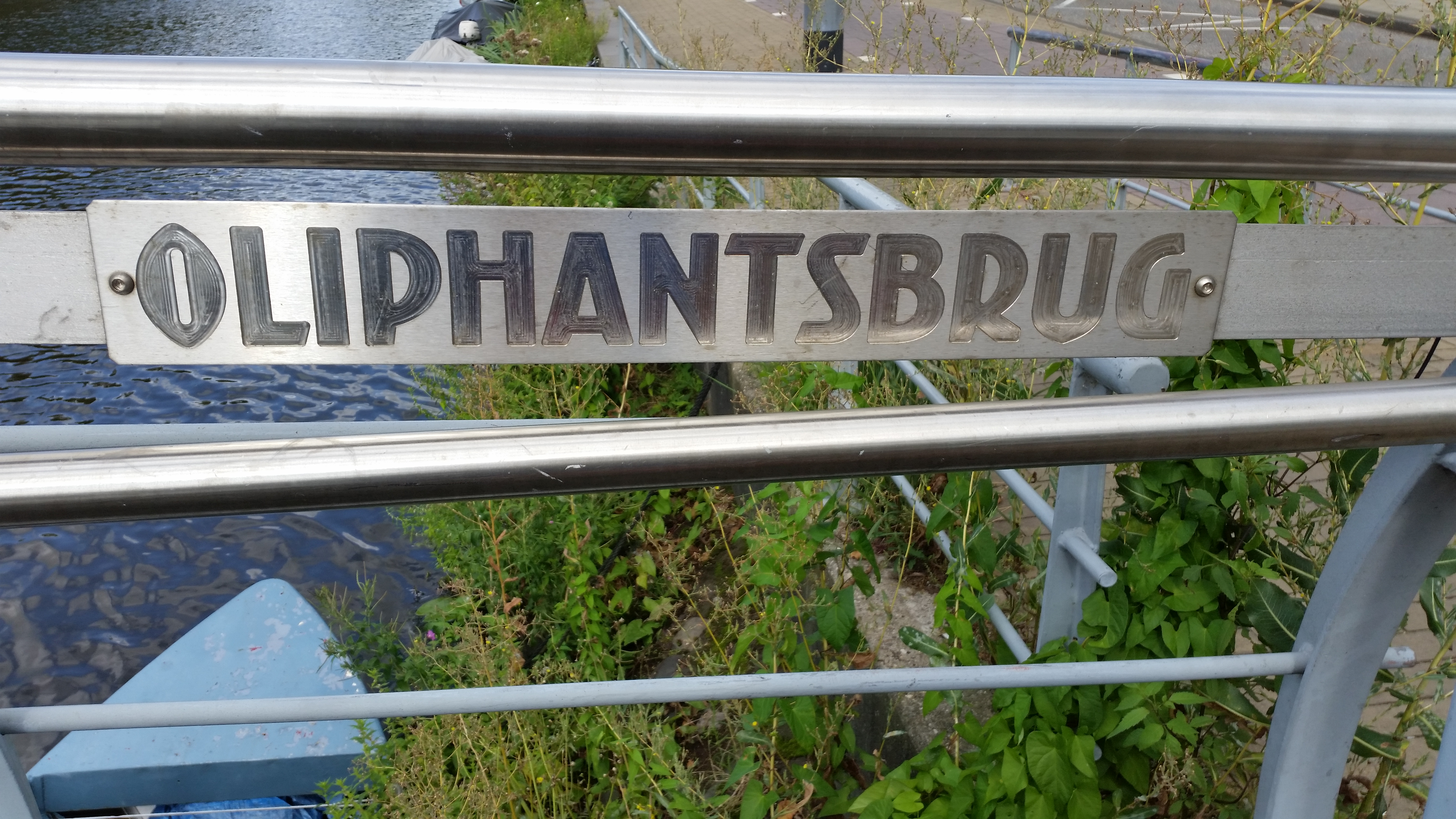 Naamplaat van Brug 1957, Oliphantsbrug